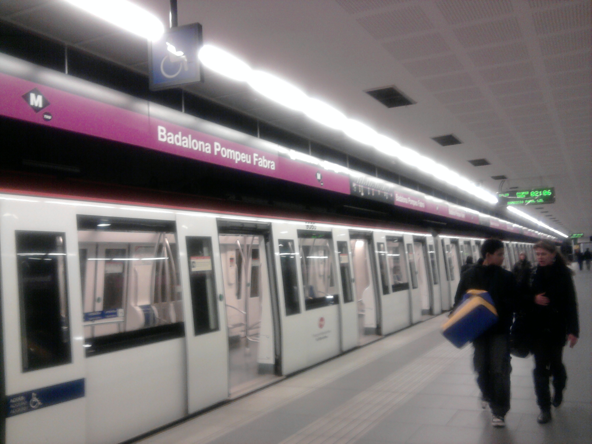 Foto capturada pel meu mòbil a l'estació de Badalona Pompeu Fabra (Metro de Barcelona).